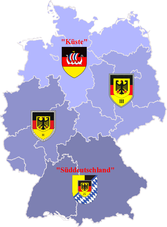 WBK II und WBK III: Verbandsabzeichen (Ärmelabzeichen) WBK I und WBK IV: Internes Verbandsabzeichen